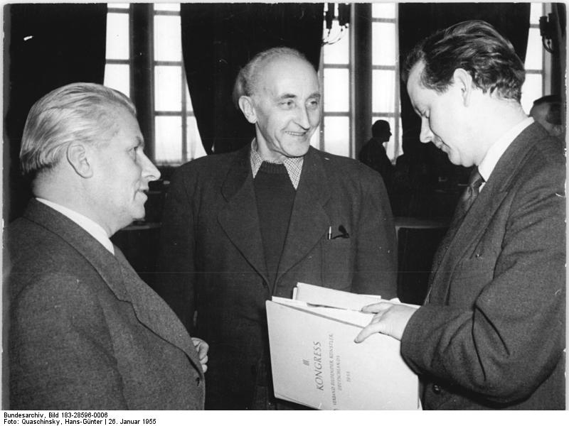 Zentralbild Quaschinsky 26.1.1955 III. Kongress des Verbandes Bildender Künstler. Im Kultursaal des VEB BAW in Berlin-Treptow, wird über mehrere Tage der III. Kongress des Verbandes Bildender Künstler durchgeführt. An dem Kongress nehmen die Delegierten aus den Bezirken der DDR und Berlins, Gastdelegierte und namhafte Künstler aus Westdeutschland teil. UBz: Der Graphiker Nationalpreisträger Hans Balzer (links), im Gespräch mit dem Kunstmaler Oskar Nerlinger (mitte) und dem Dozenten Prof. Klaus Wittkugel.